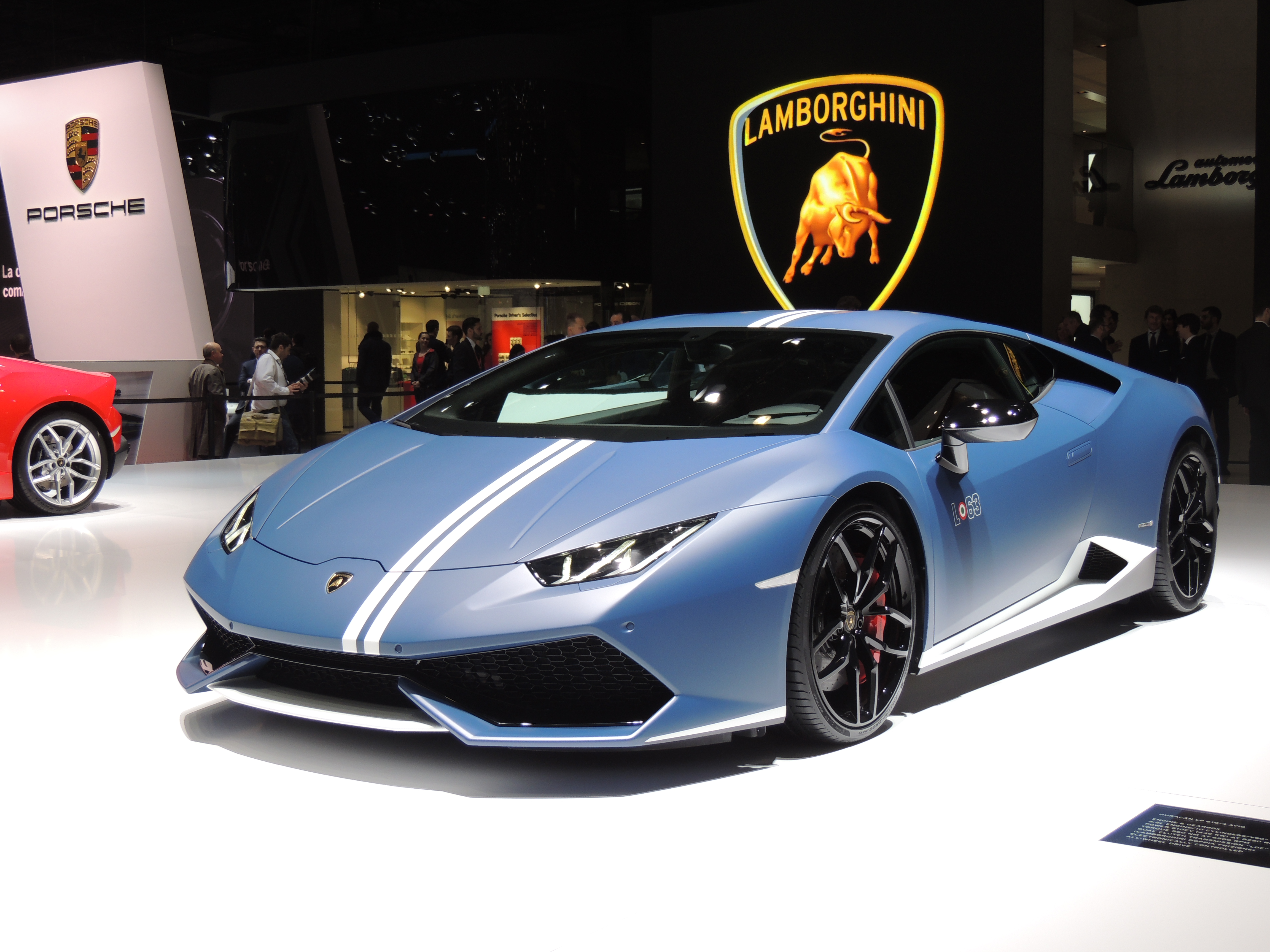 Lamborghini, salon de Genève 2016